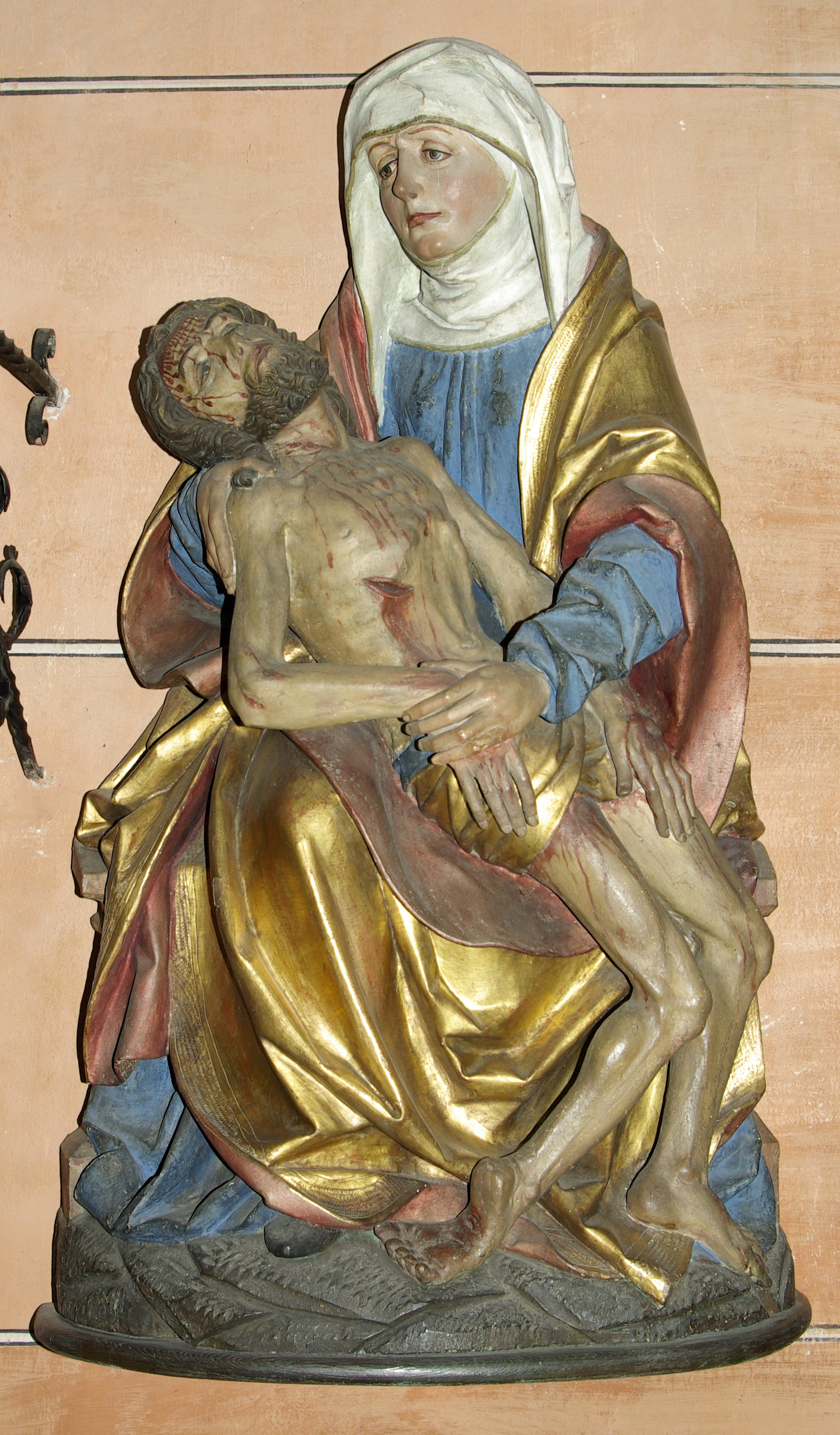 Pietà in der Kirche St. Andreas in Kalchreuth. Es handelt sich vermutlich um eine Nürnberger Arbeit um 1500.